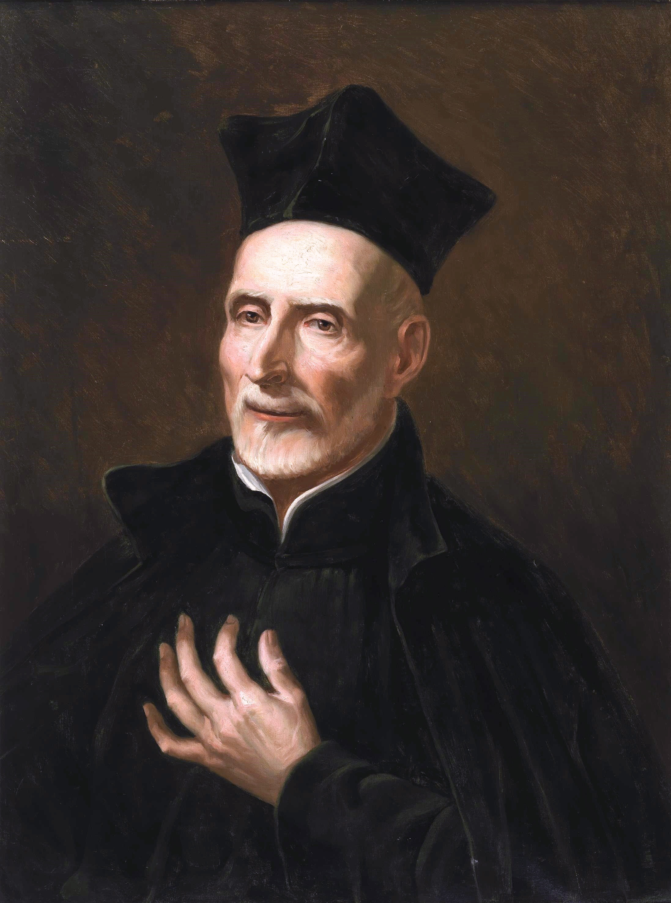 Retrato del sacerdote, pedagogo y santo español San José de Calasanz (1557-1648).